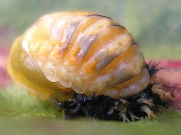 Harmonia axyridis. Larva to pupa series B, image 2 of 4 - Larva has just shedded skin. Location: Hengelo (Overijssel), Netherlands --- nl: Veelkleurig Aziatisch lieveheersbeestje (Harmonia axyridis). Larve tot pop serie B, plaatje 1 van 4 - Larve heeft zojuist de huid afgestroopt. Locatie: Hengelo (Overijssel) Trefwoorden: Verpoppen